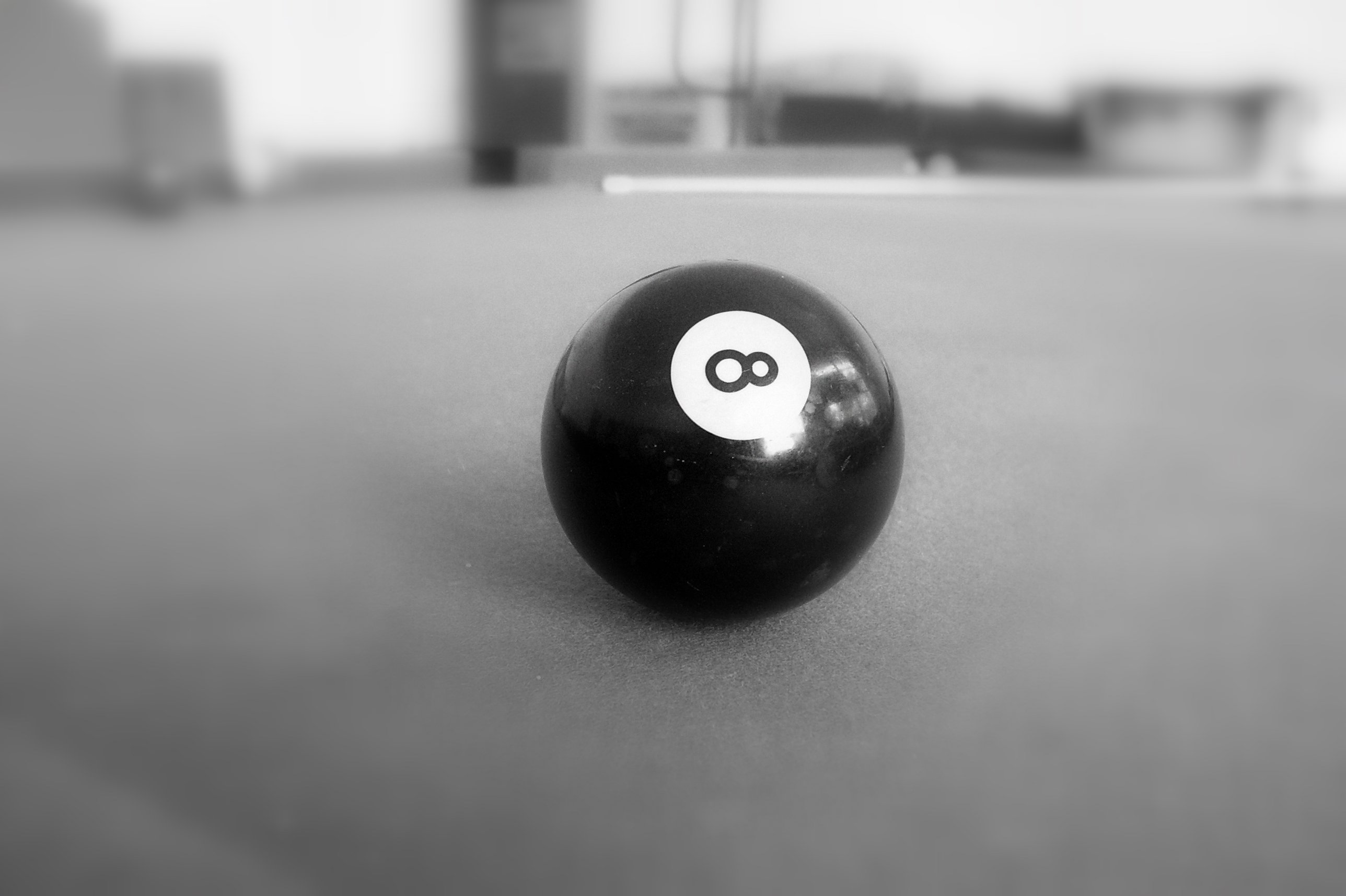 8 ball..